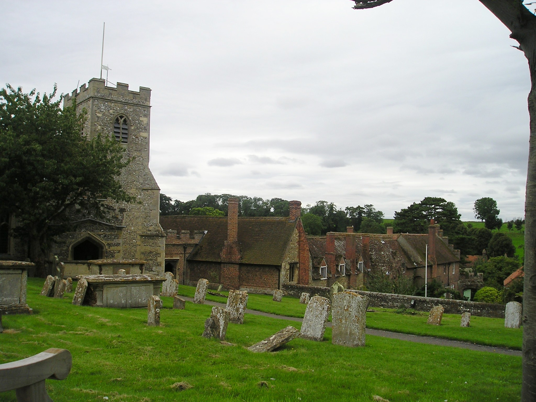 Ewelme,_Nordfront_der_Armenhäuser